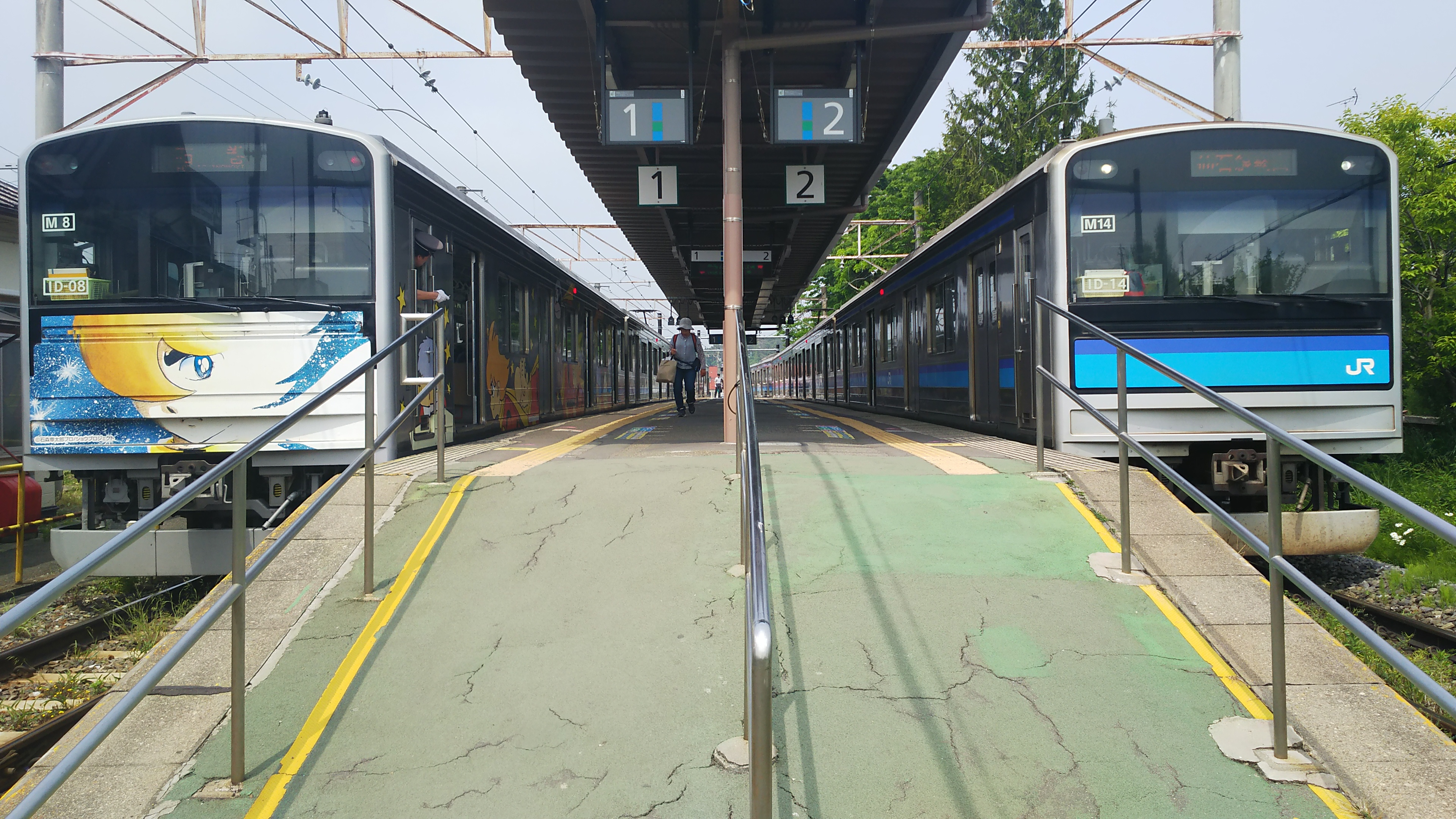 高城町駅ホーム